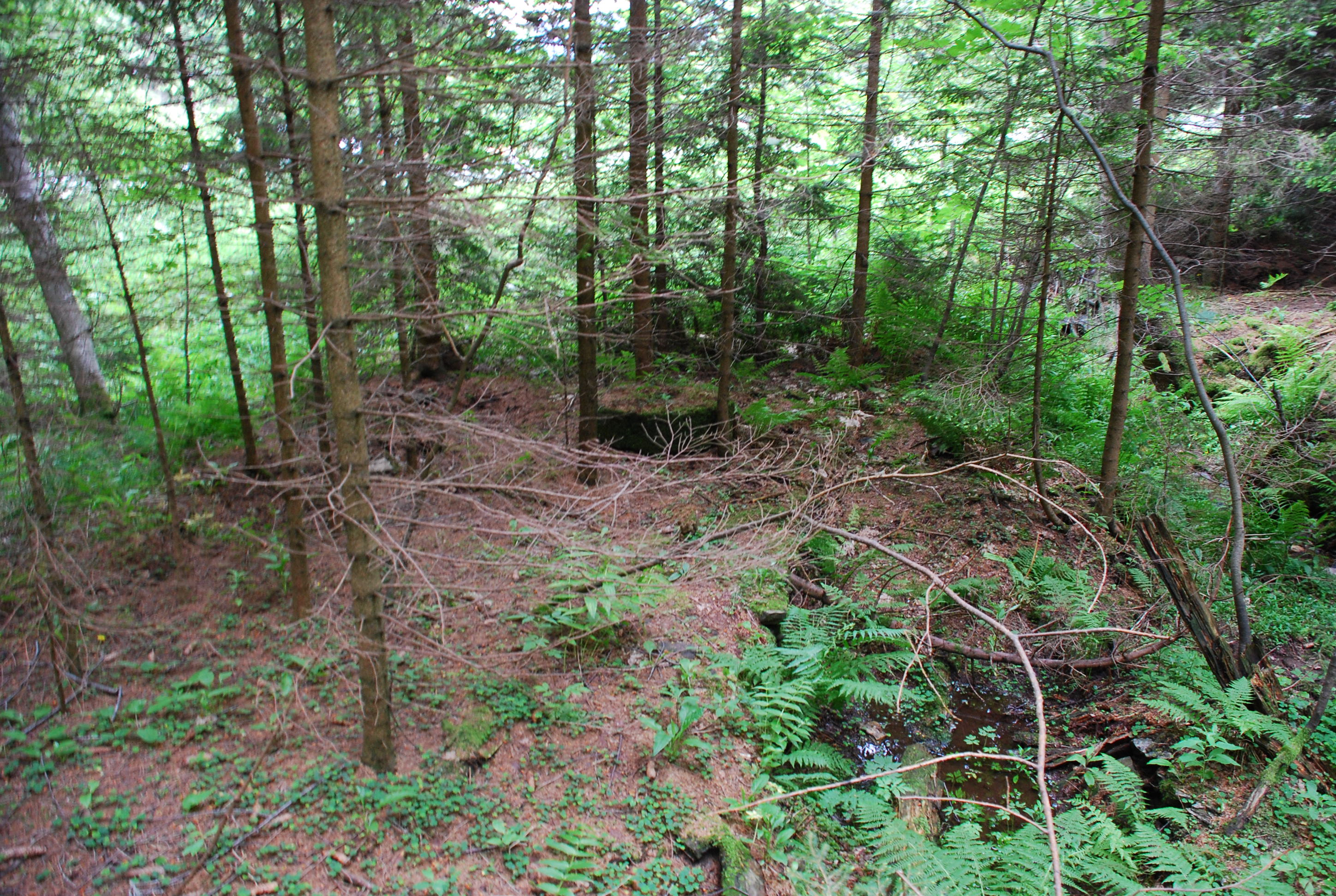 Platz der ehemaligen Mühle am Gratzenbach